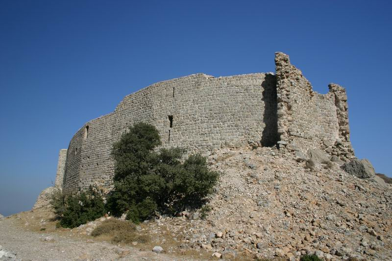 Abu Qubeis eigenes Foto von 2004 Mewes 21:06, 20. Feb 2005 (CET) public domain Kernburg